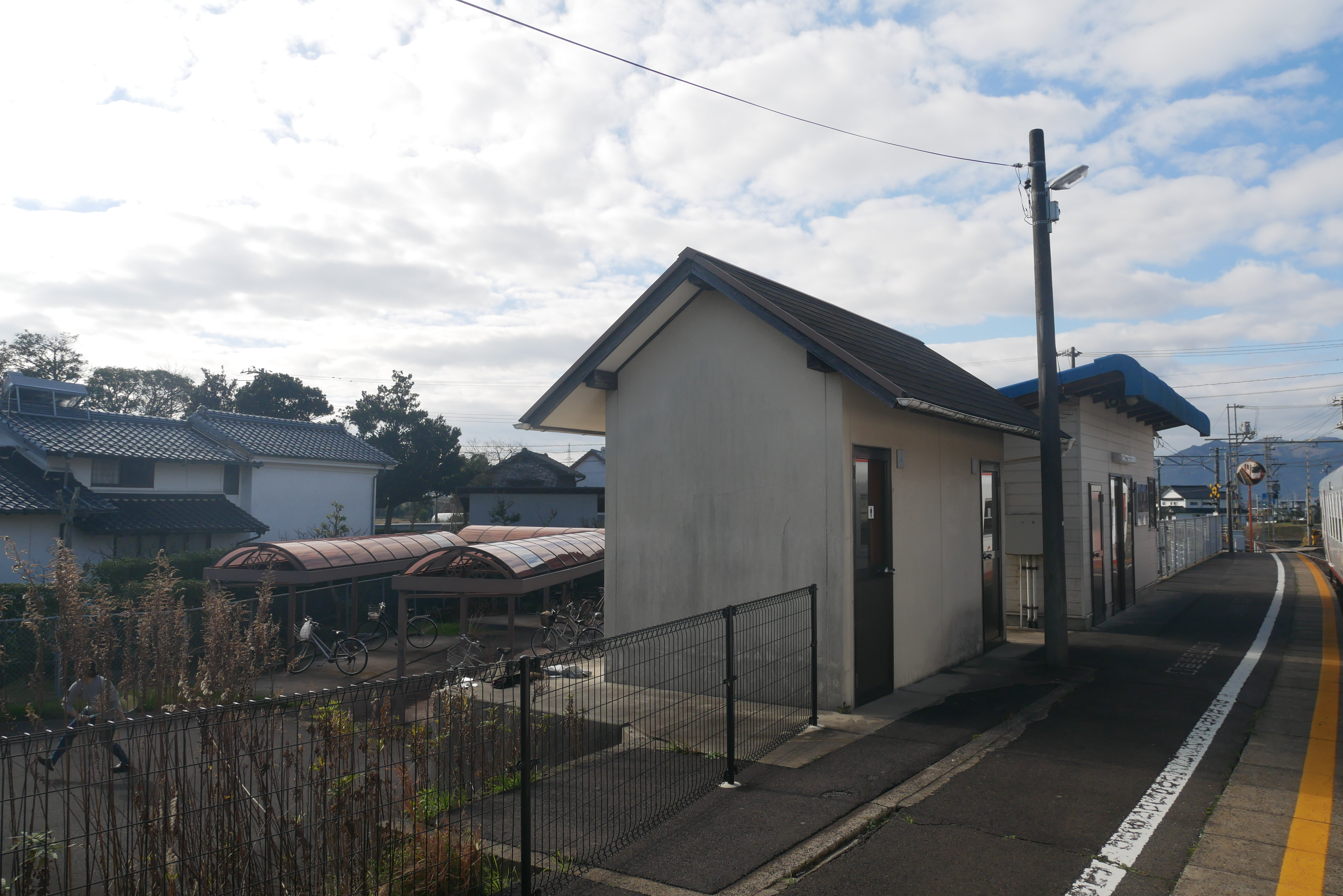 Nunozaki Station (布崎駅)